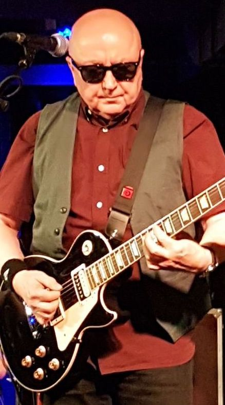 Lutz Künzel mit Ruff As Stone 2018 in Rostock